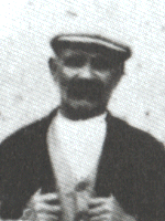 Foto di Antonio Andrea Cucca con indosso il tradizionale berretto sardo.